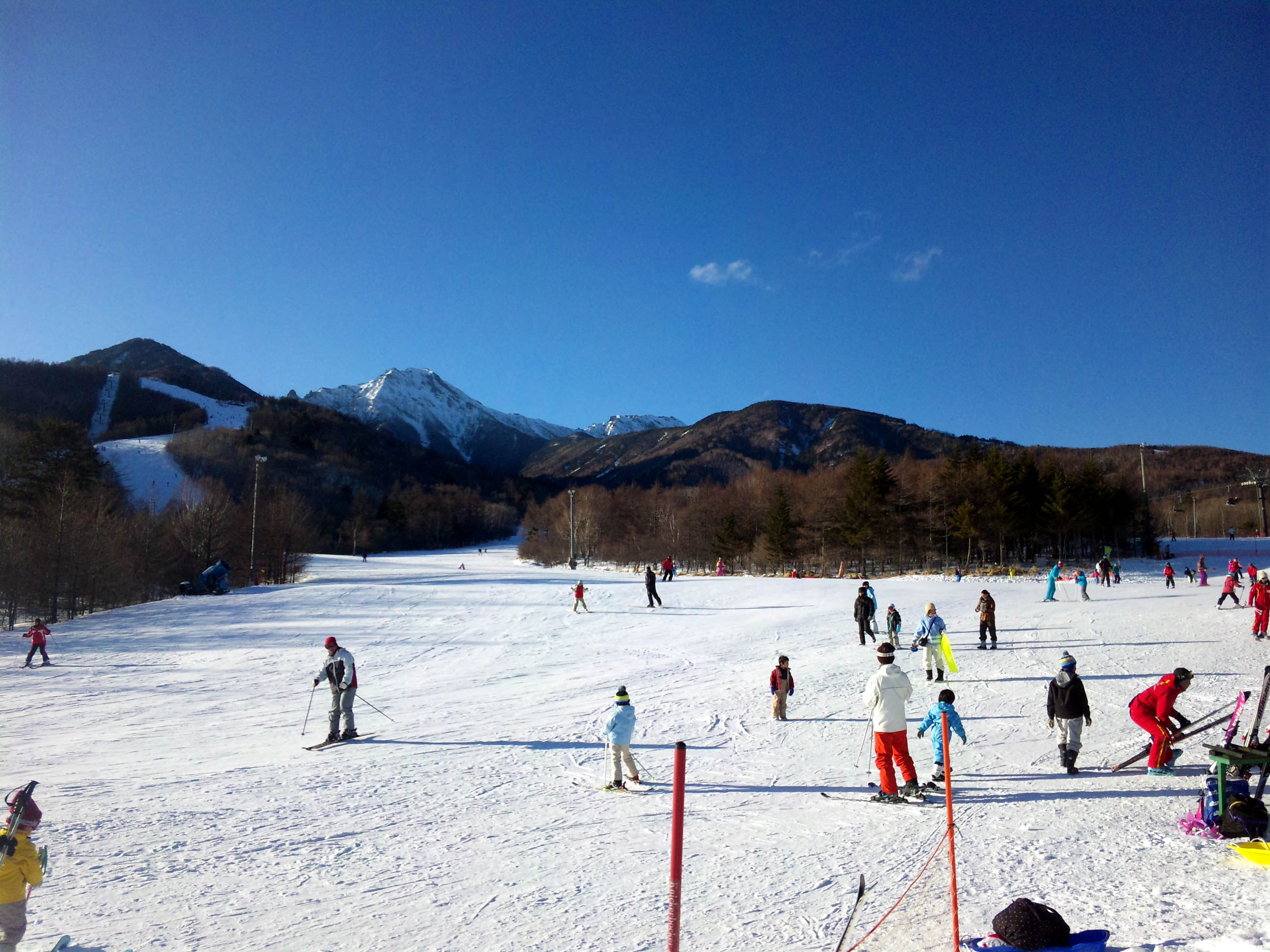 サンメドウズ清里スキー場 ドコモ携帯電話 SH-01Bにて撮影